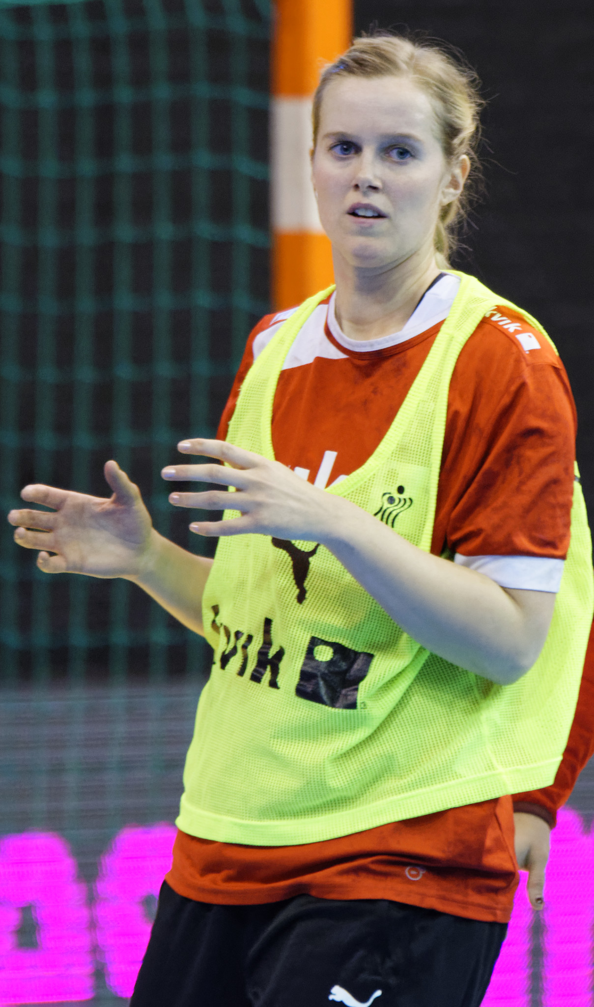 Rencontre France - Danemark lors de la Golden League. A Dijon, le 19 mars 2015.